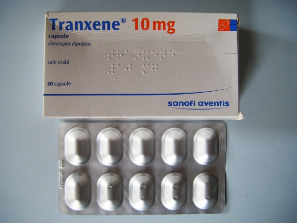 Tranxene 10mg tabletteja (kloratsepaatti)